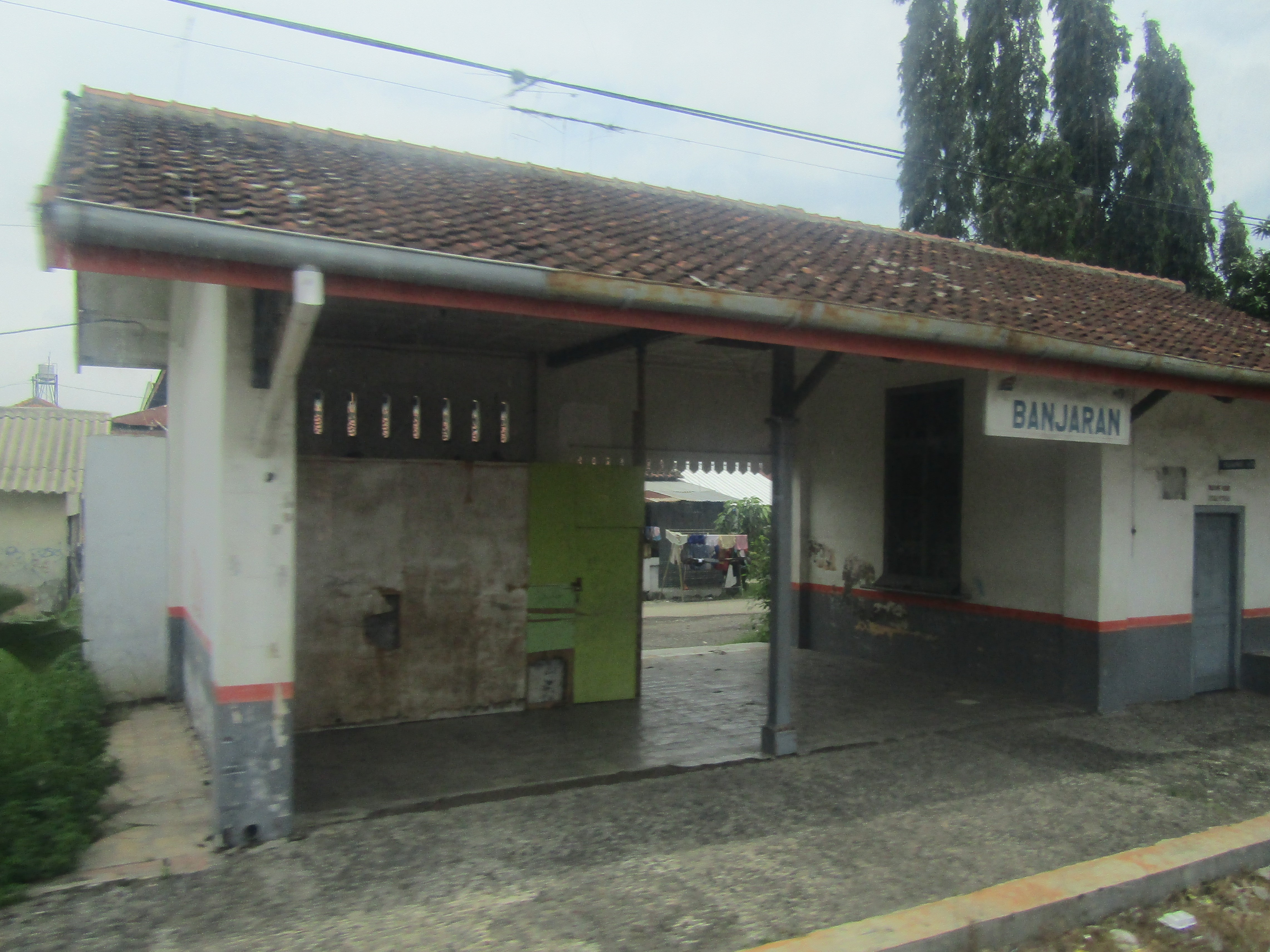 Tampak peron Stasiun Banjaran, 2019